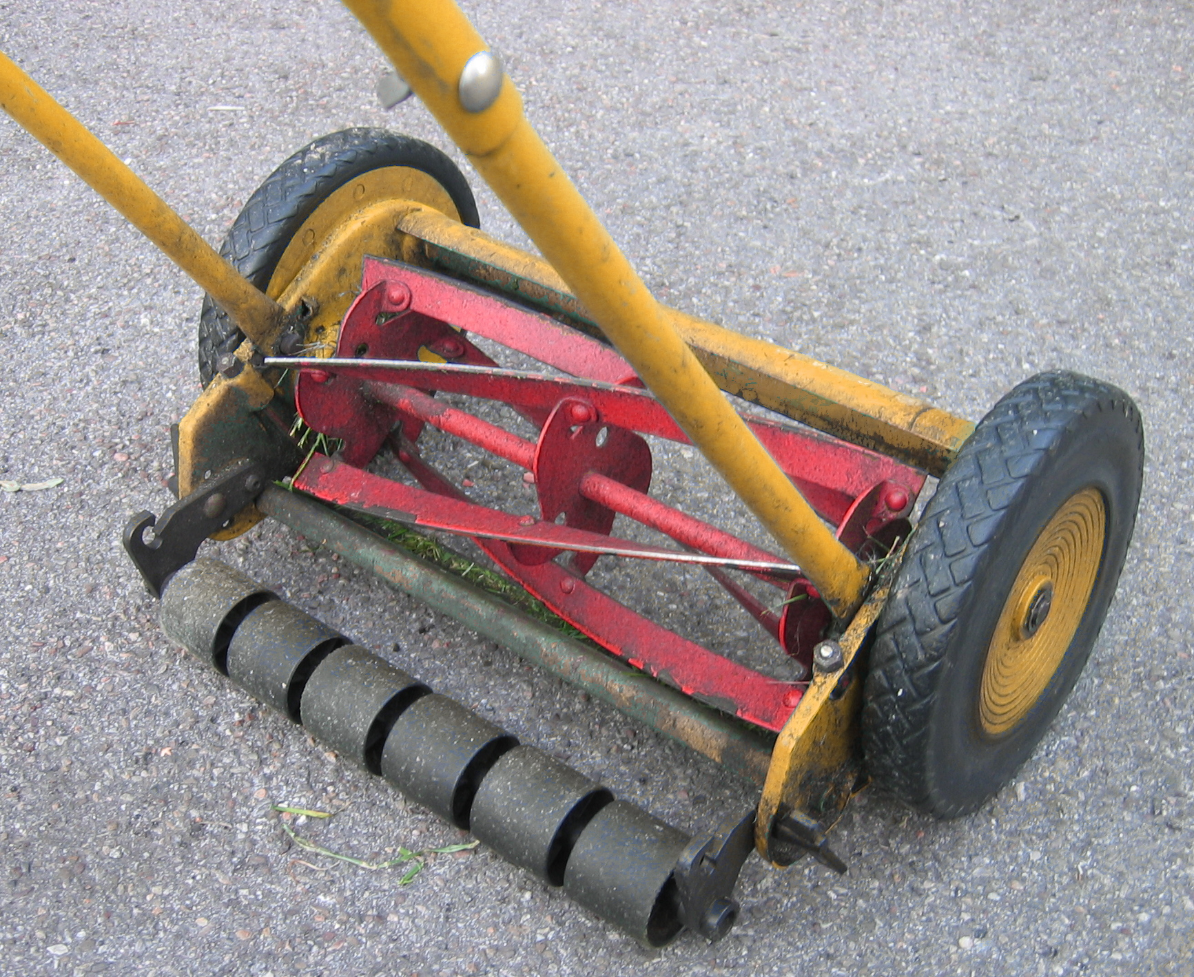 Spindelmäher Messer/Klingen